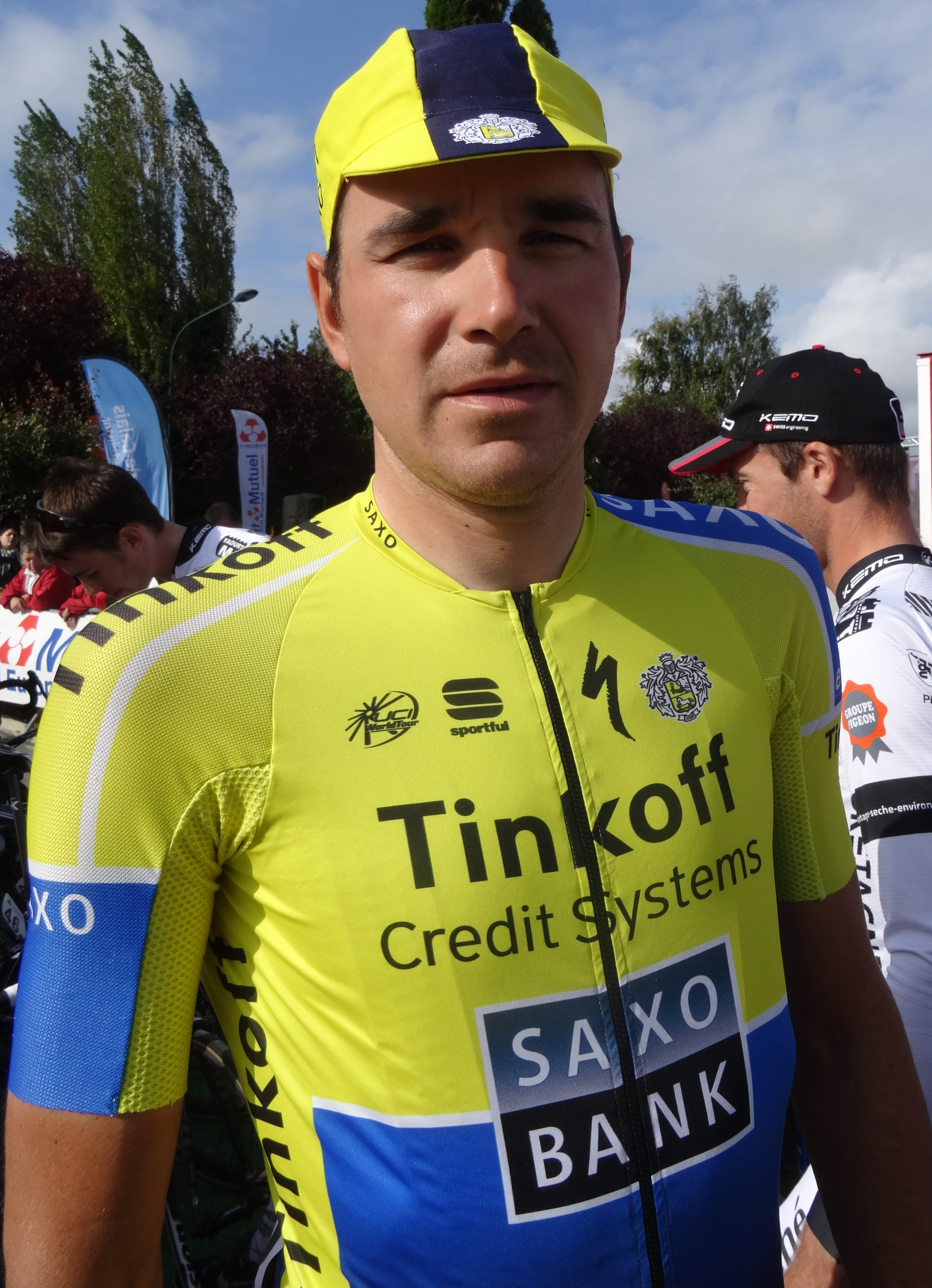 Reportage réalisé le dimanche 21 septembre à l'occasion du départ et de l'arrivée du Grand Prix d'Isbergues 2014 à Isbergues, Nord-Pas-de-Calais, France.